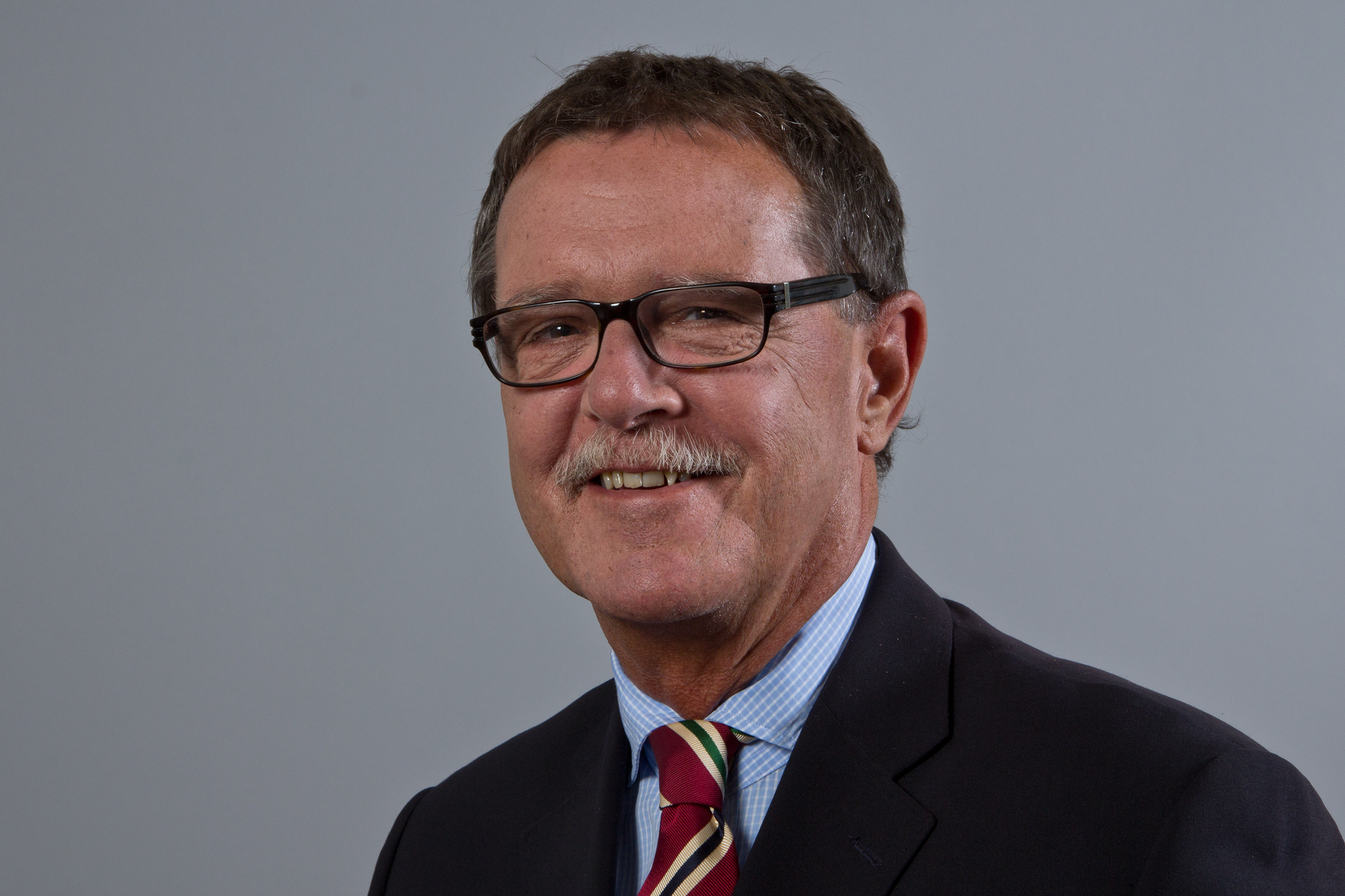 Karsten Jasper (* 13. April 1952 in Tellingstedt) ist ein deutscher Landwirt, Politiker (CDU) und Mitglied des Landtages von Schleswig-Holstein. Wikipedia im Landtag – Schleswig-Holstein 21.–23. August 2013 in Kiel Fragen zur Nachnutzung Wenn Sie Fragen zur Nachnutzung dieses Bildes haben, können Sie sich jederzeit gern an wenden Personality rights warning Although this work is freely licensed or in the public domain, the person(s) shown may have rights that legally restrict certain re-uses unless those depicted consent to such uses. In these cases, a model release or other evidence of consent could protect you from infringement claims.